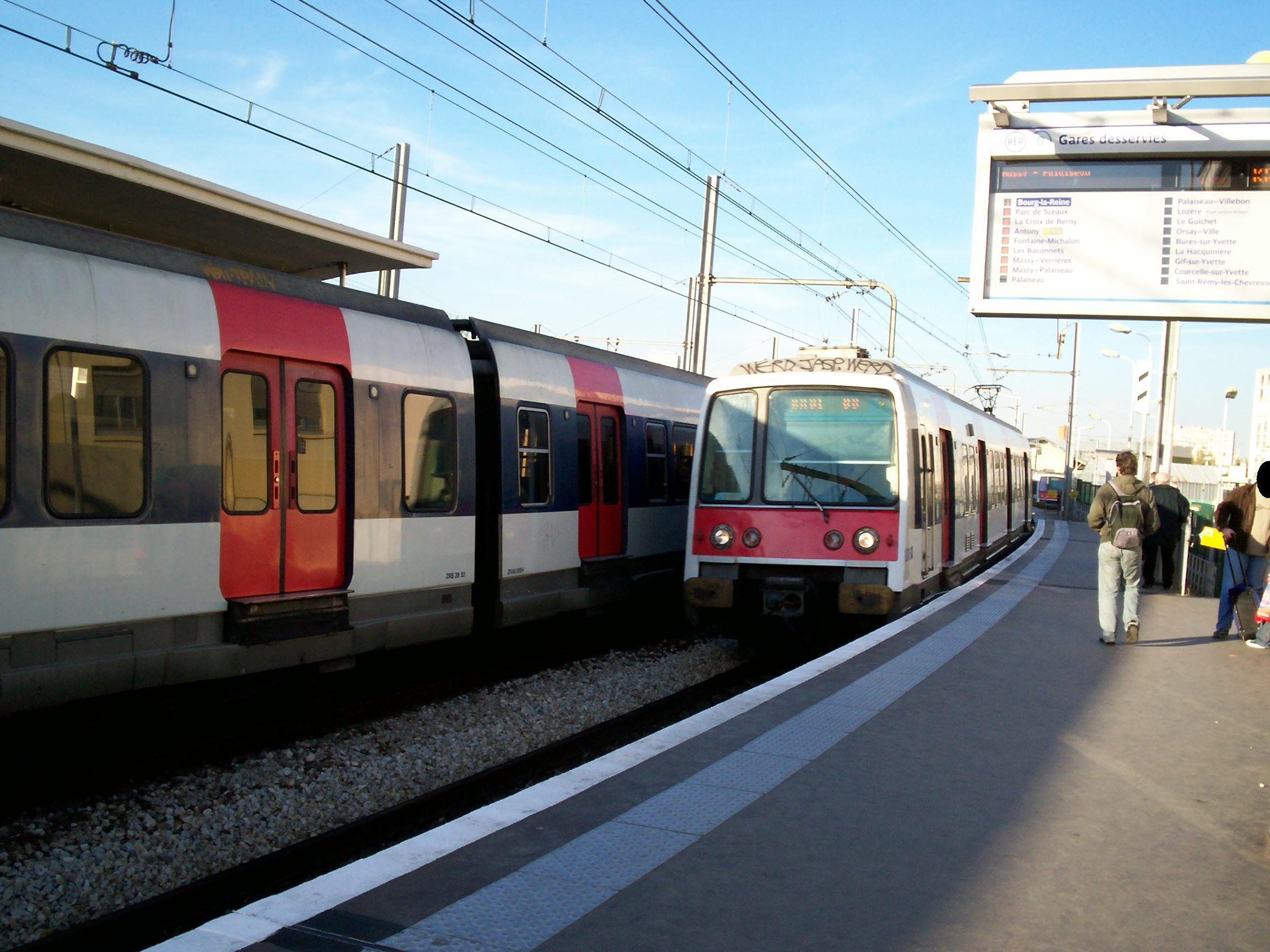 MI 79 - Gare de Bourg-la-Reine